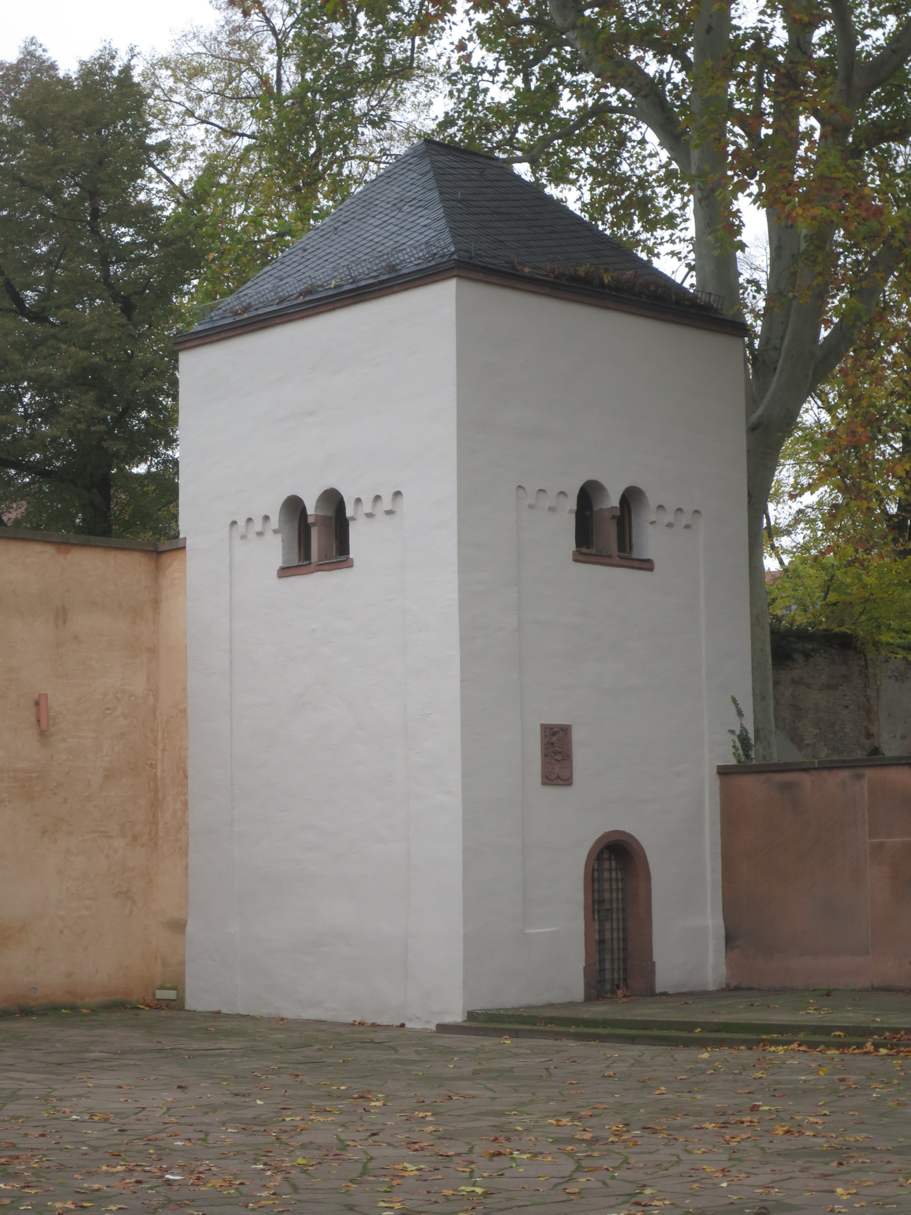 Neuromanischer Turm von Heyl, Worms, heute: Platz der Partnerschaft